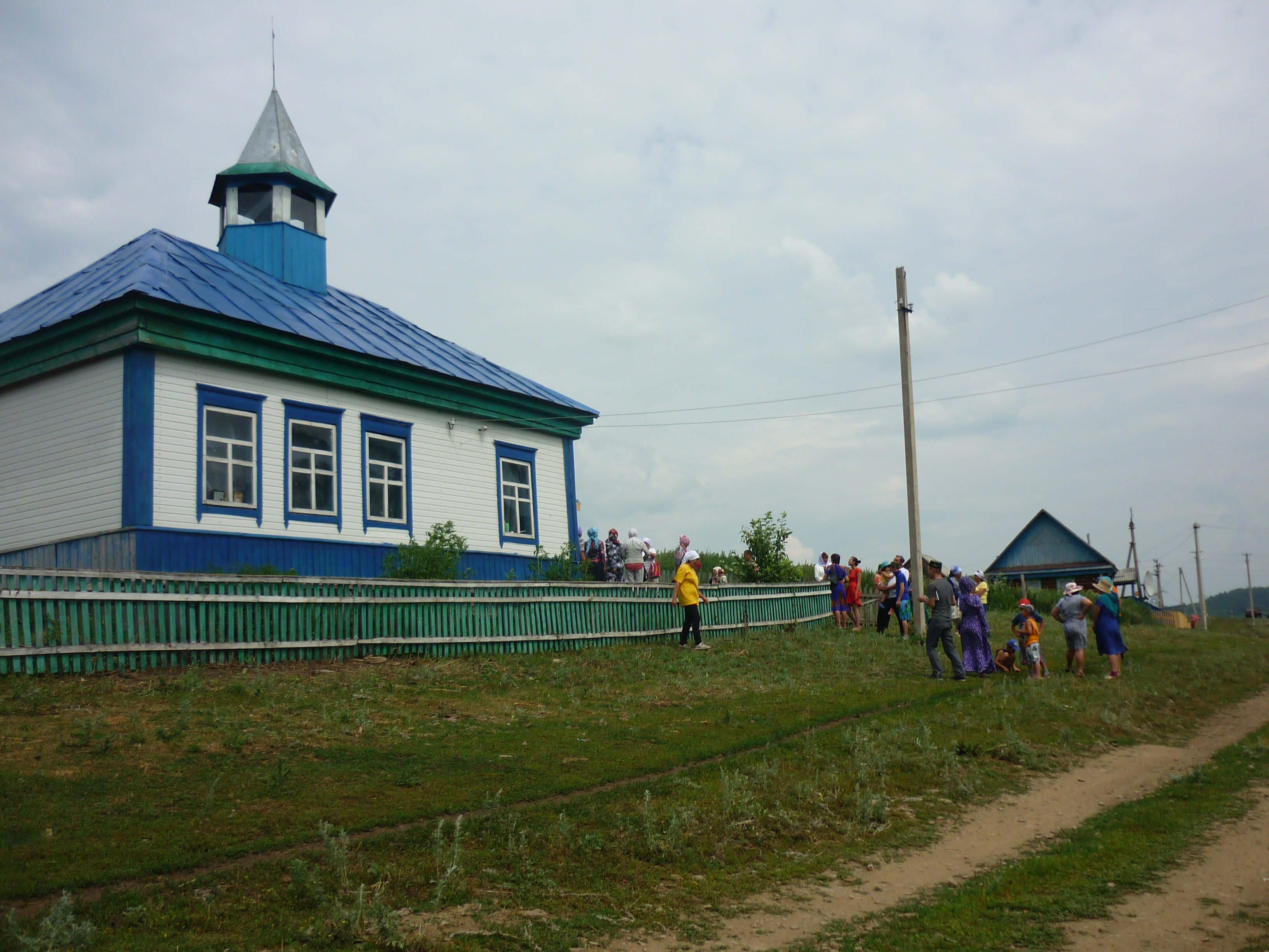 Башҡортса: Үрге Нөгөш ауылындағы мәсет